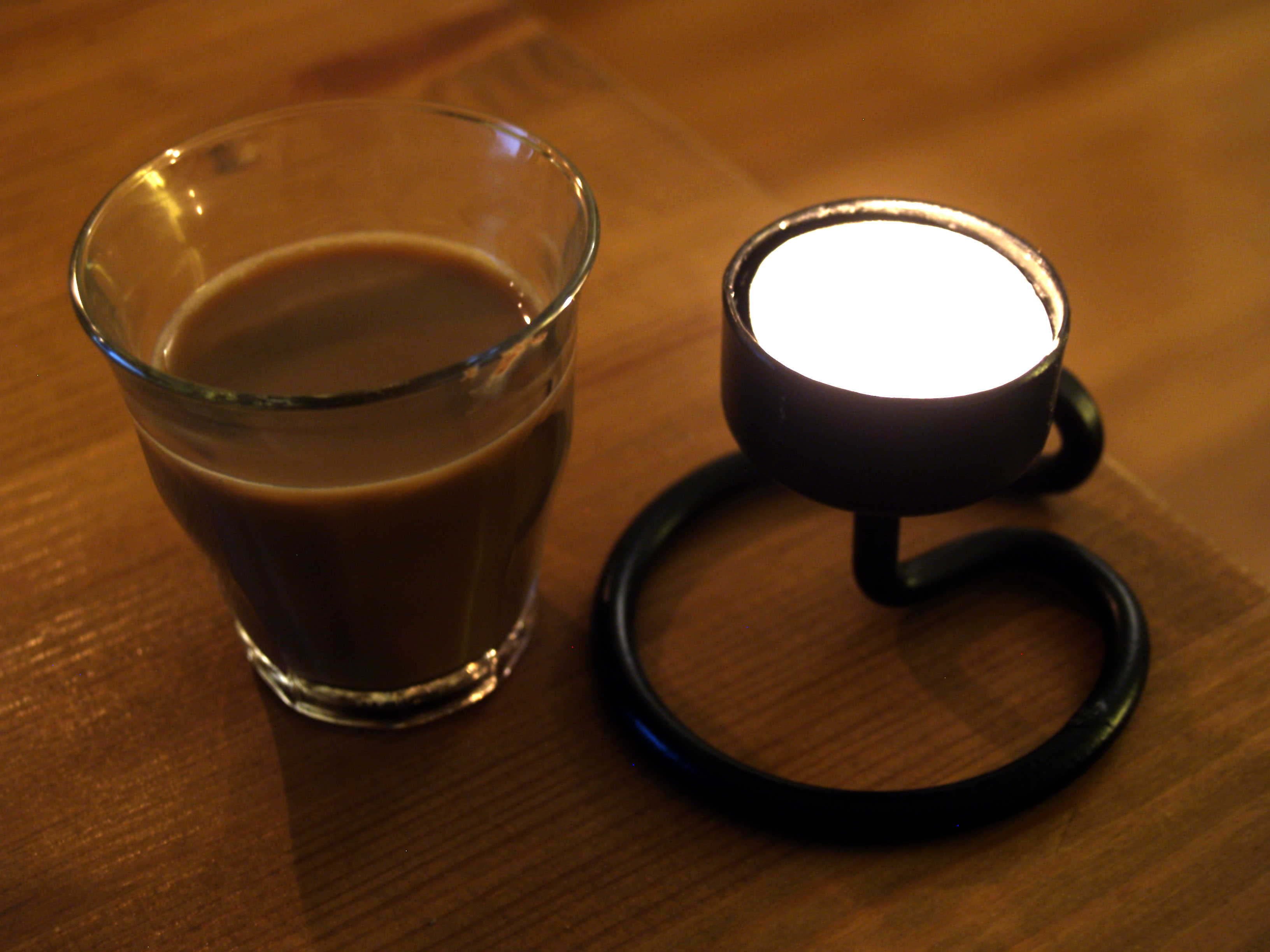 Kaffe med mælk